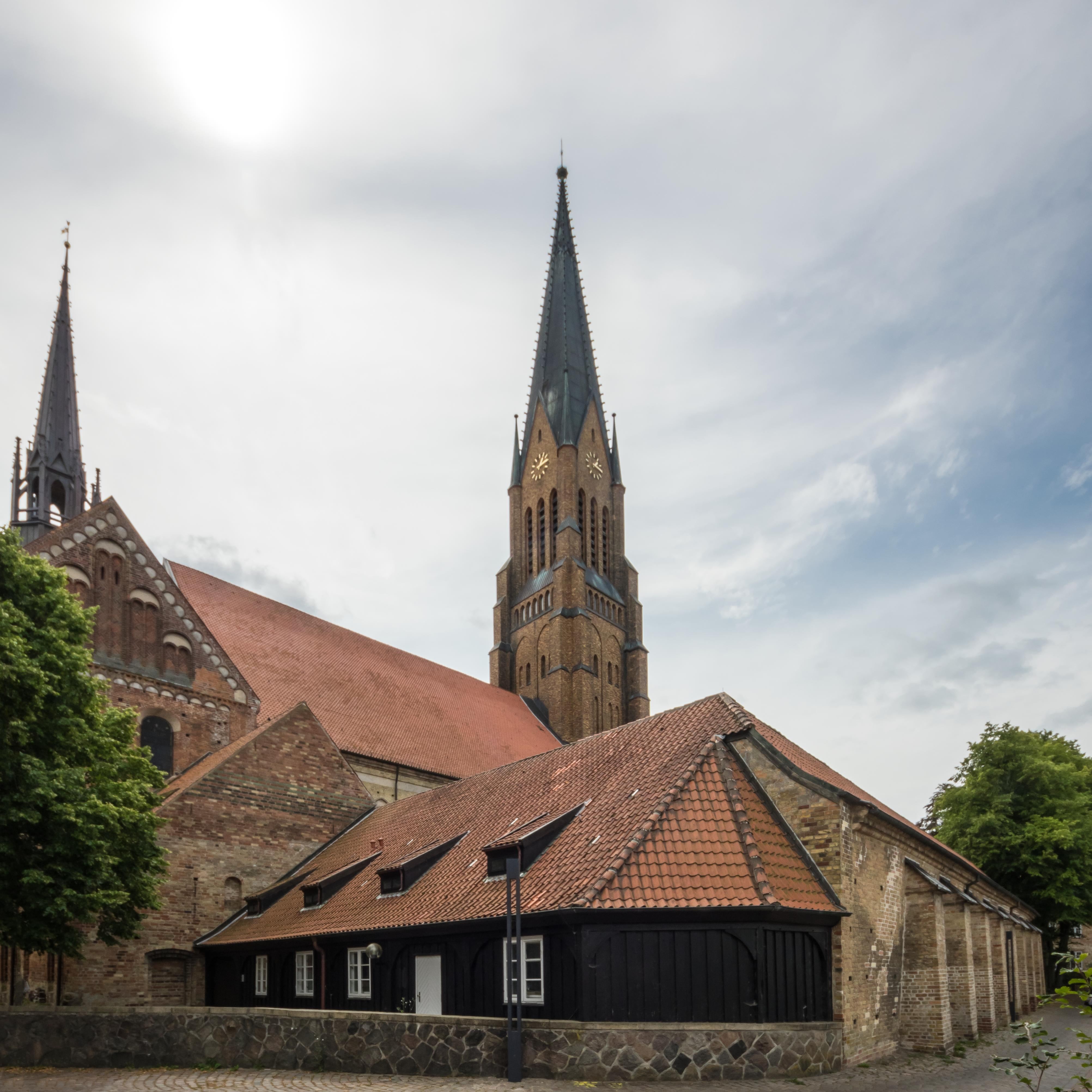 Bilder aus Schleswig Bilder des Doms von außen Bilder vom Dom St. Petri in Schleswig